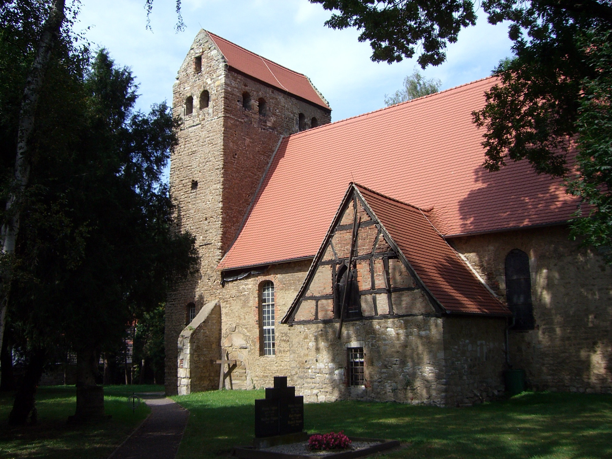 Die Kirche in Großgörschen